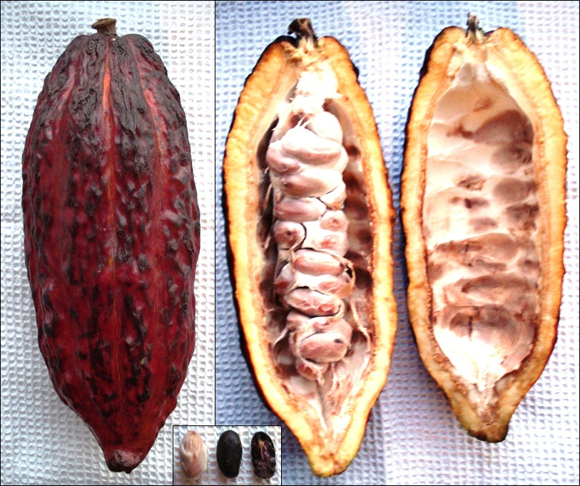 Kakaofrucht - ganz, geöffnet & Bohnen